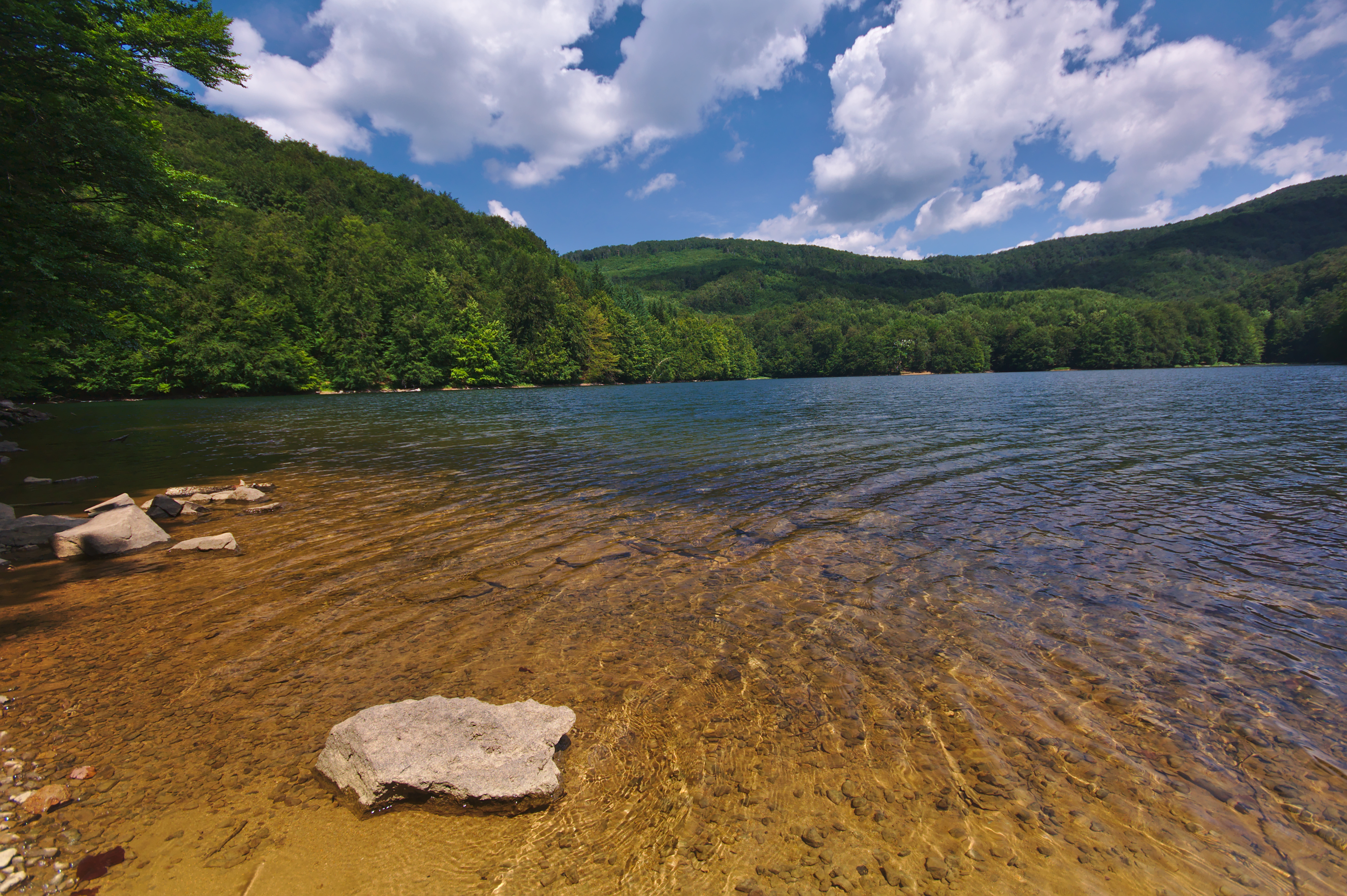 Národná prírodná rezervácia Morské oko - jazero, CHKO Vihorlat